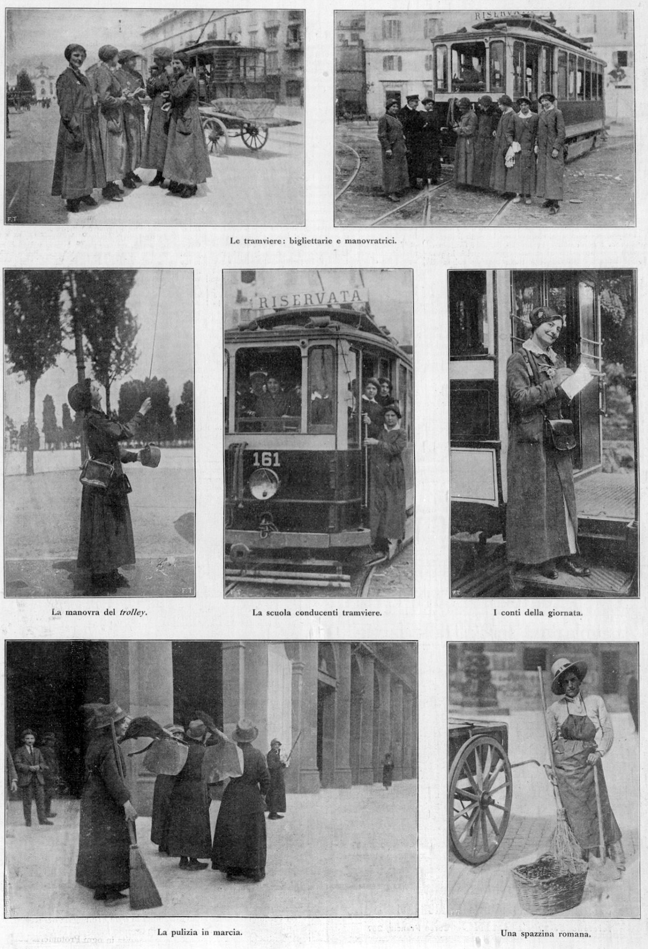 Impiego femminile nei trasporti pubblici a Roma durante la Prima Guerra Mondiale